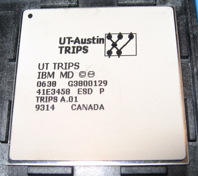 Gehäuse des TRIPS-Prozessor Prototypen